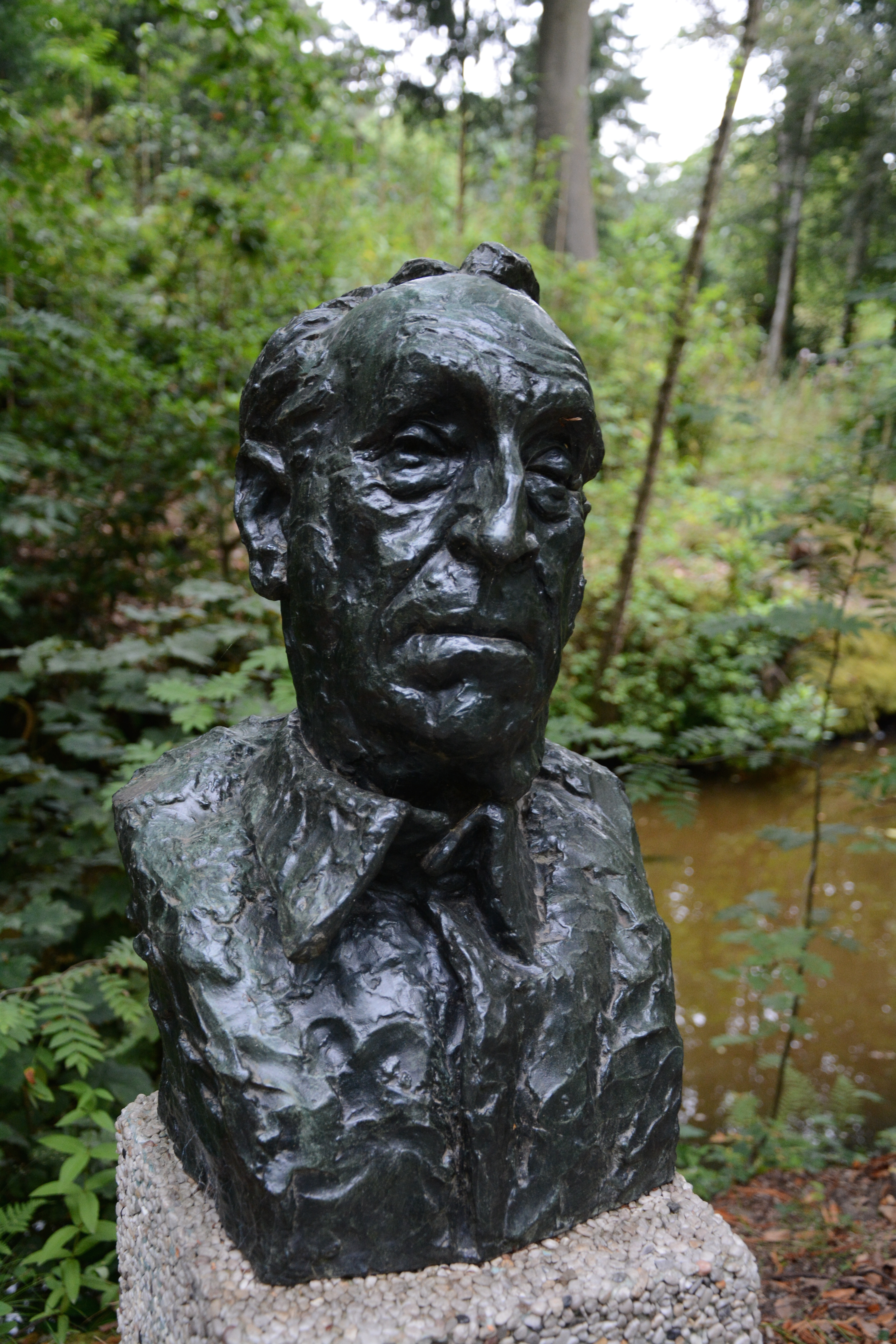 Idel Ianchelevici, Buste van August Vermeylen, 1935